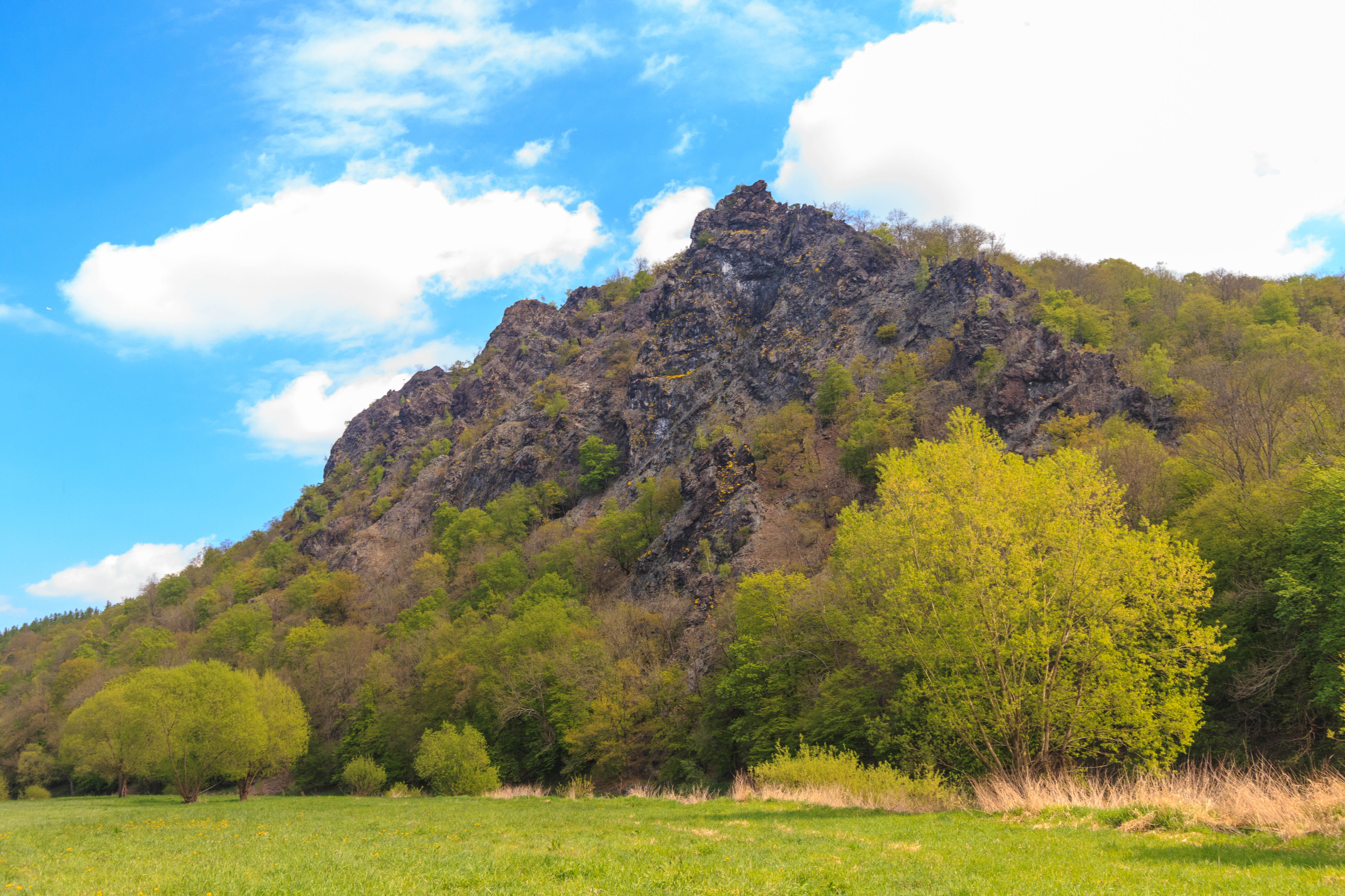 NPR Týřov - Týřovické skály Project: Chráněná území